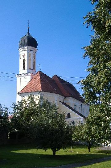 Donaumünster